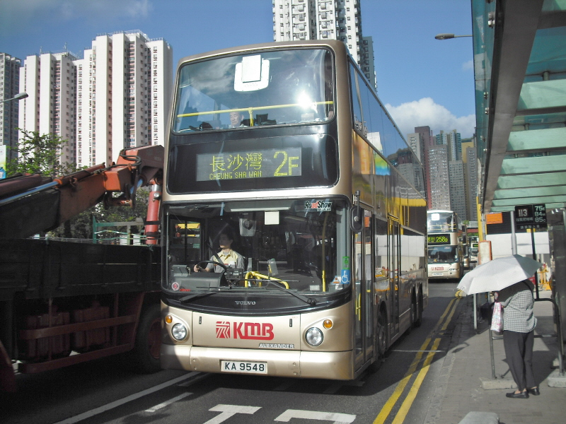 九龍巴士2F線，攝於黃大仙中心對出巴士站